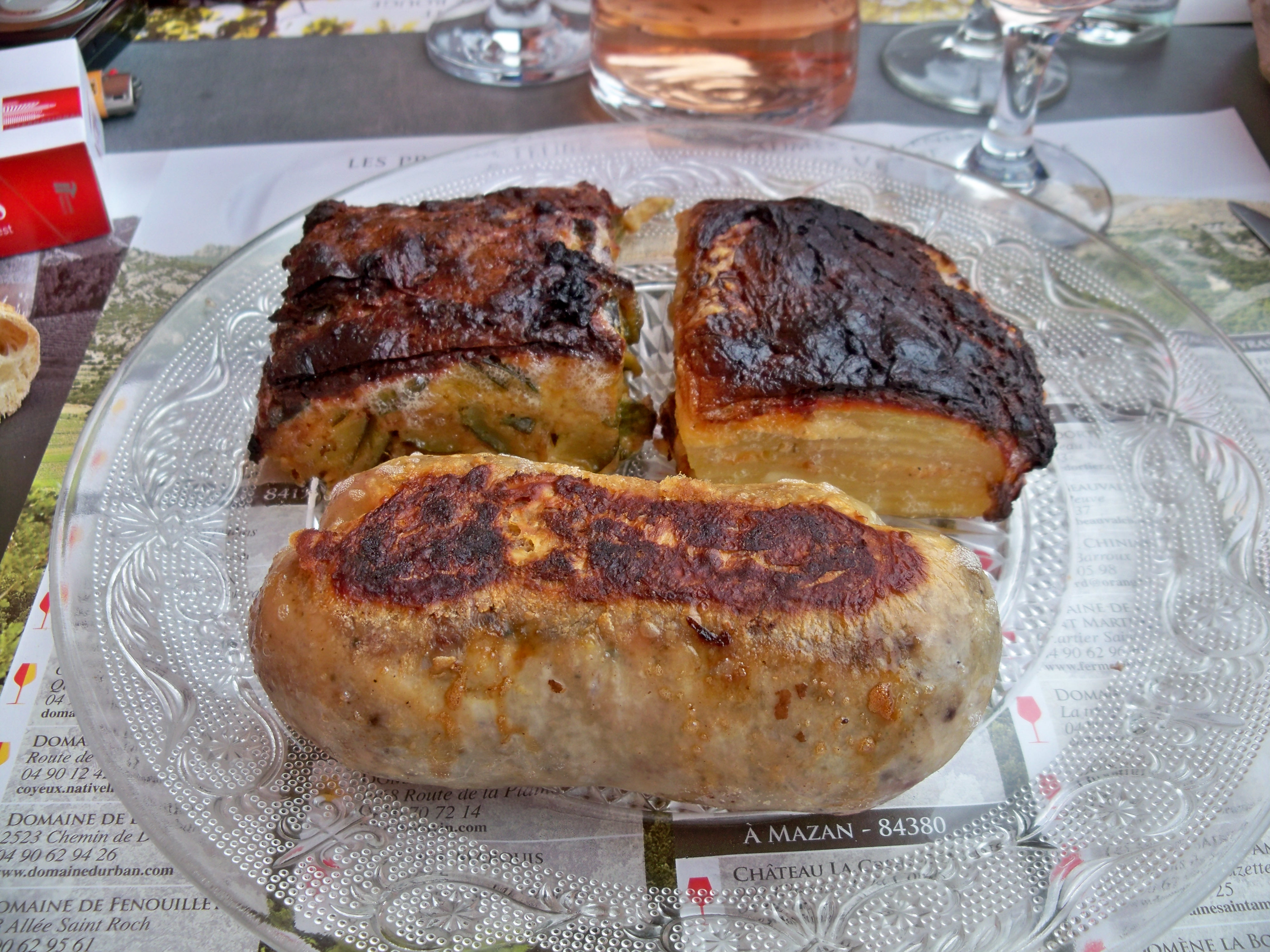 assiette d'andouilette et gratin dauphinois